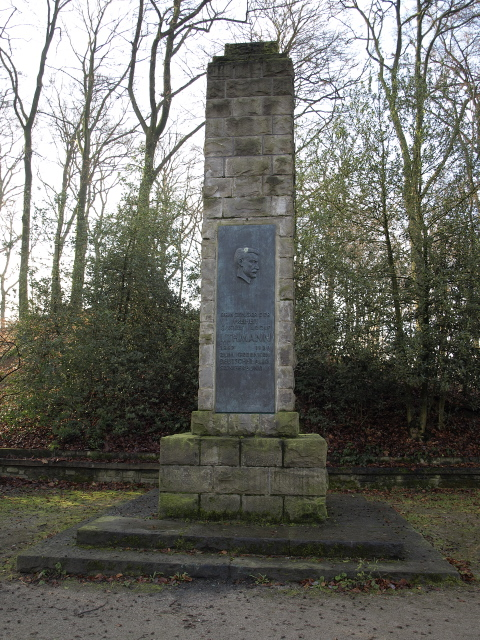 Gustav Adolf Uthmann Denkmal Nordpark Wuppertal Barmen, errichtet 1930, für den Arbeiterliedermacher des Deutschen Arbeiter-Sängerbund, geb. 29.06.1987, gest. 22.06.1920, Teilansicht. Bronzetafel gefertigt von Harald Schmahl